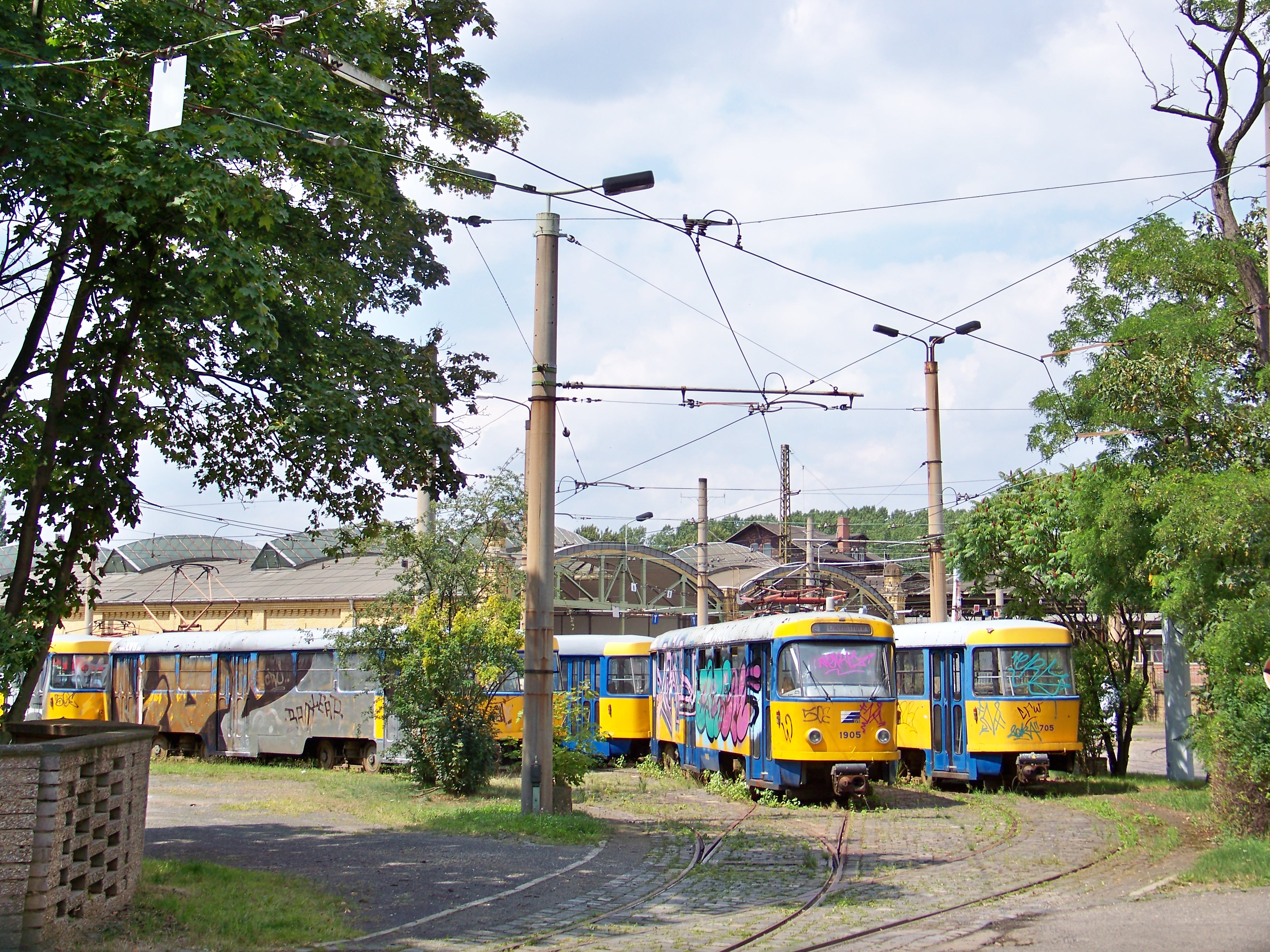 Straßenbahnhof Leutzsch in Leipzig, Nutzung zur Abstellung der ausgemusterten Leipziger Tatra T4D Trieb- und B4D Beiwagen (Stand Juli 2009)